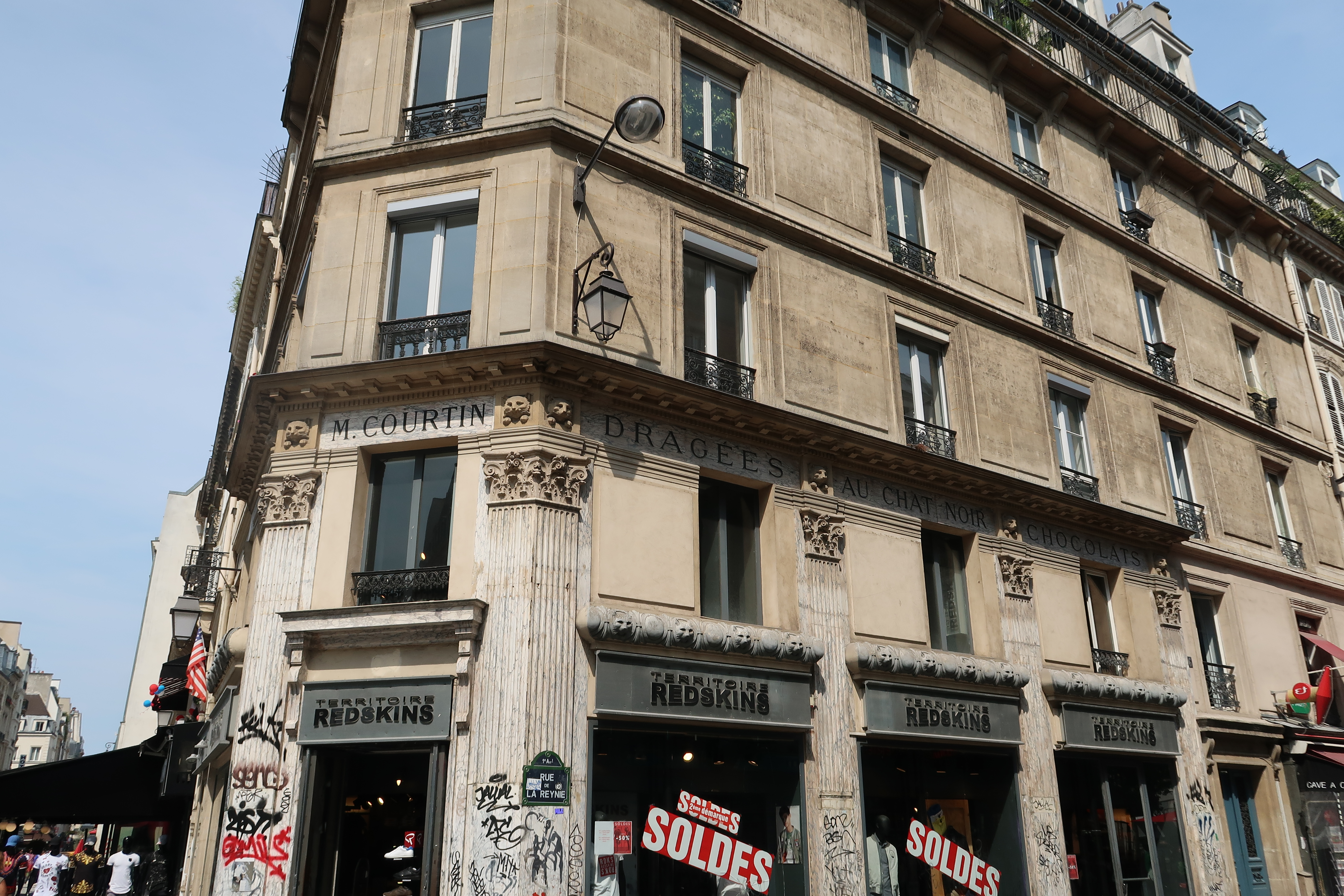 Ancienne confiserie, au croisement de la rue de La Reynie et de la rue Saint-Denis (Paris, 1er).